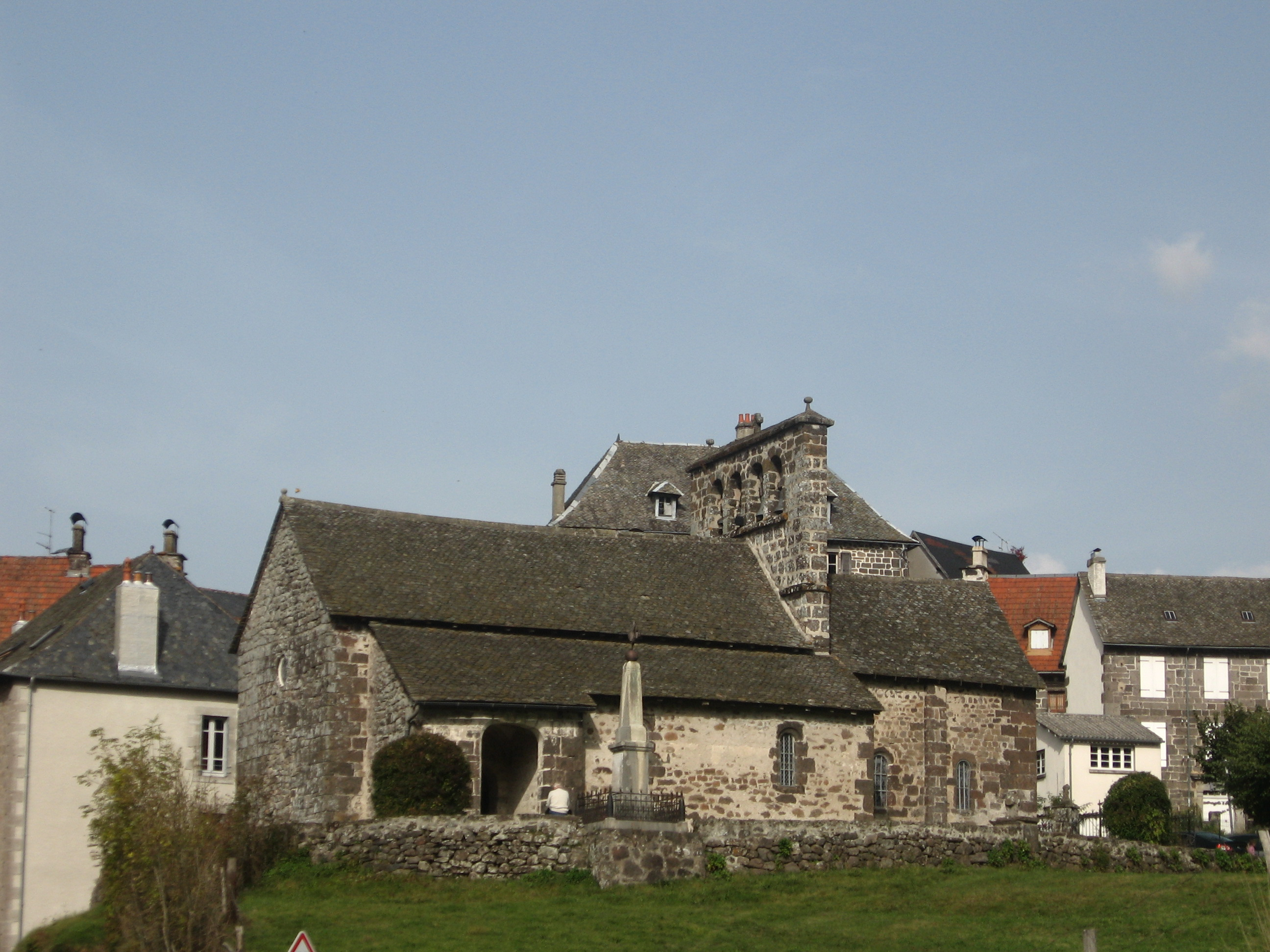 vallée de la Jordanne dans l'Auvergne Cantal